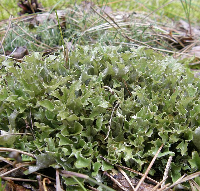 Cetraria islandica